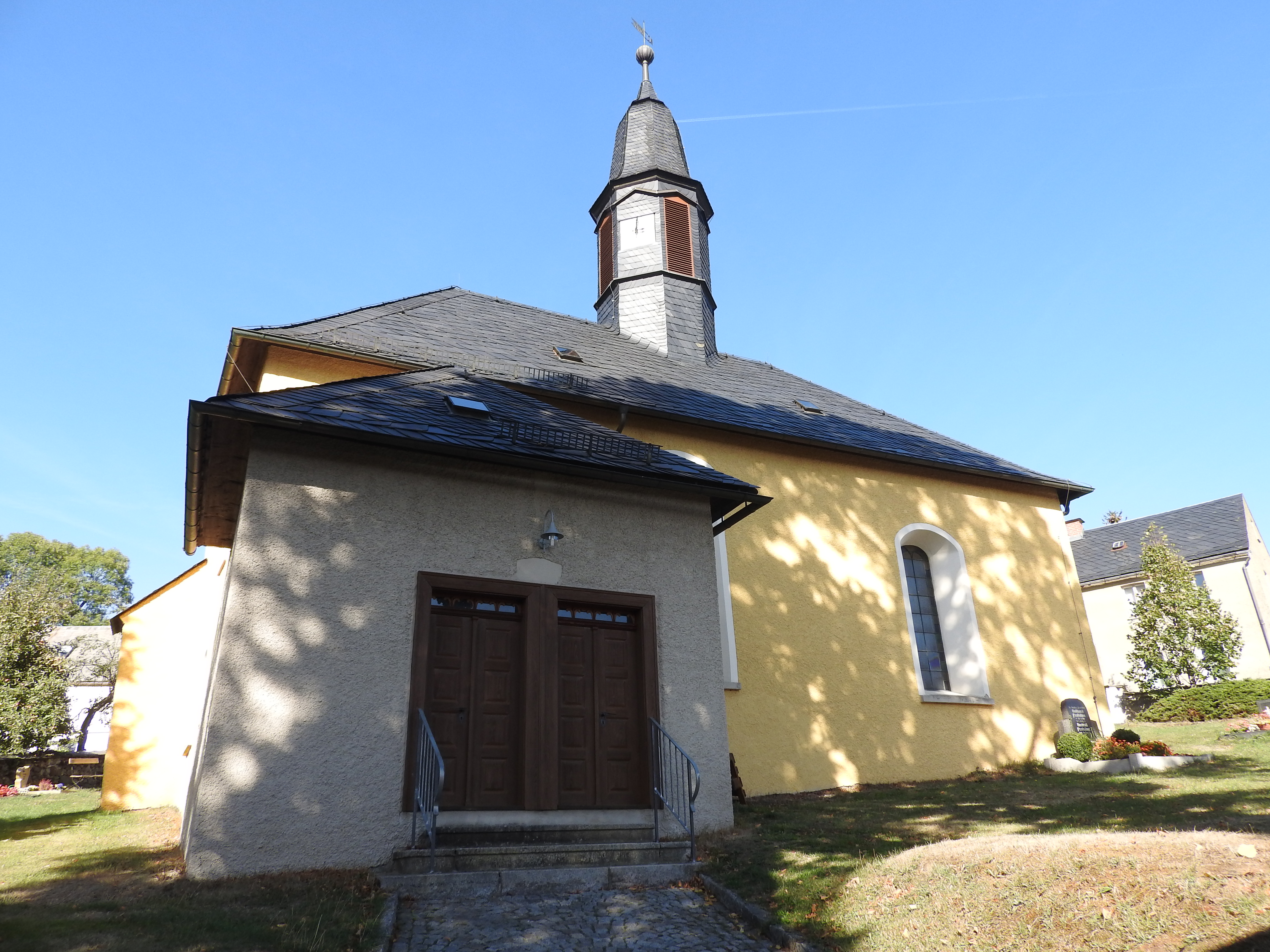 Kirche in Arnsgrün, Zeulenroda-Triebes in Thüringen